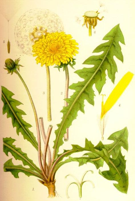 Taraxacum ruderalia roten, bladrosetten och stängselbaserna, blomkorg, densamma med mogna frukter, en enskild blomma (4/1), flygfrukt (4/1), blom- eller fruktfästet under fruktspridningen, ett stycke av stängeln, kluvet längs efter i fyra delar.